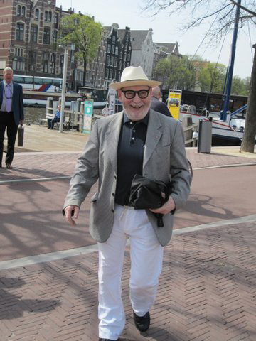 Bart Robbers in Amsterdam bij het stadhuis aan de Amstel